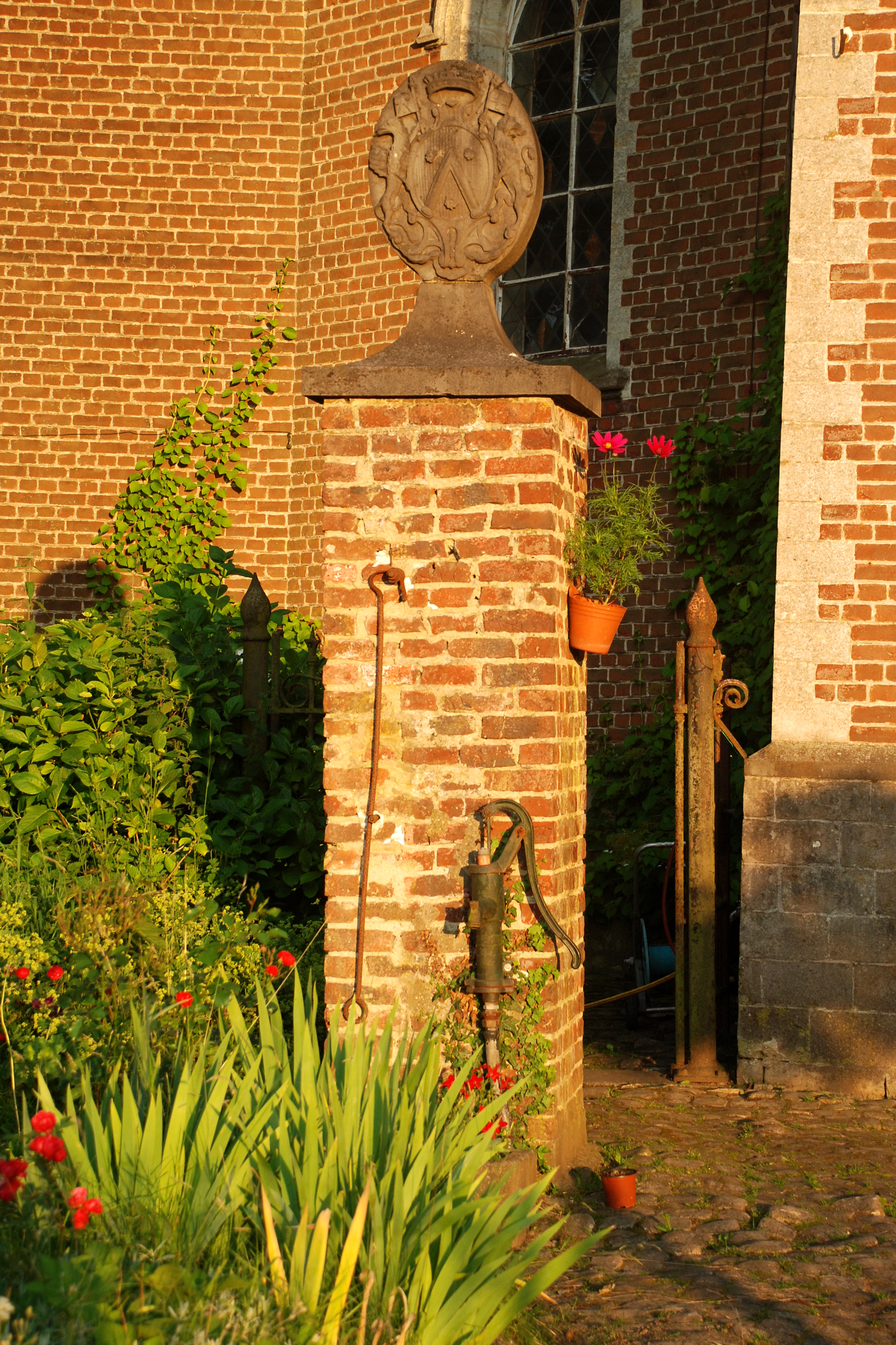 Belgique - Brabant wallon - Genappe - Loupoigne - Chapelle Notre-Dame de Foy